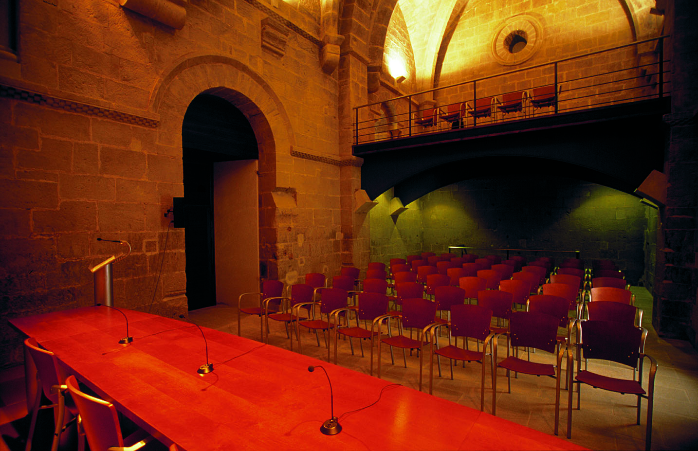 Iglesia románica de San Miguel (S. XII)